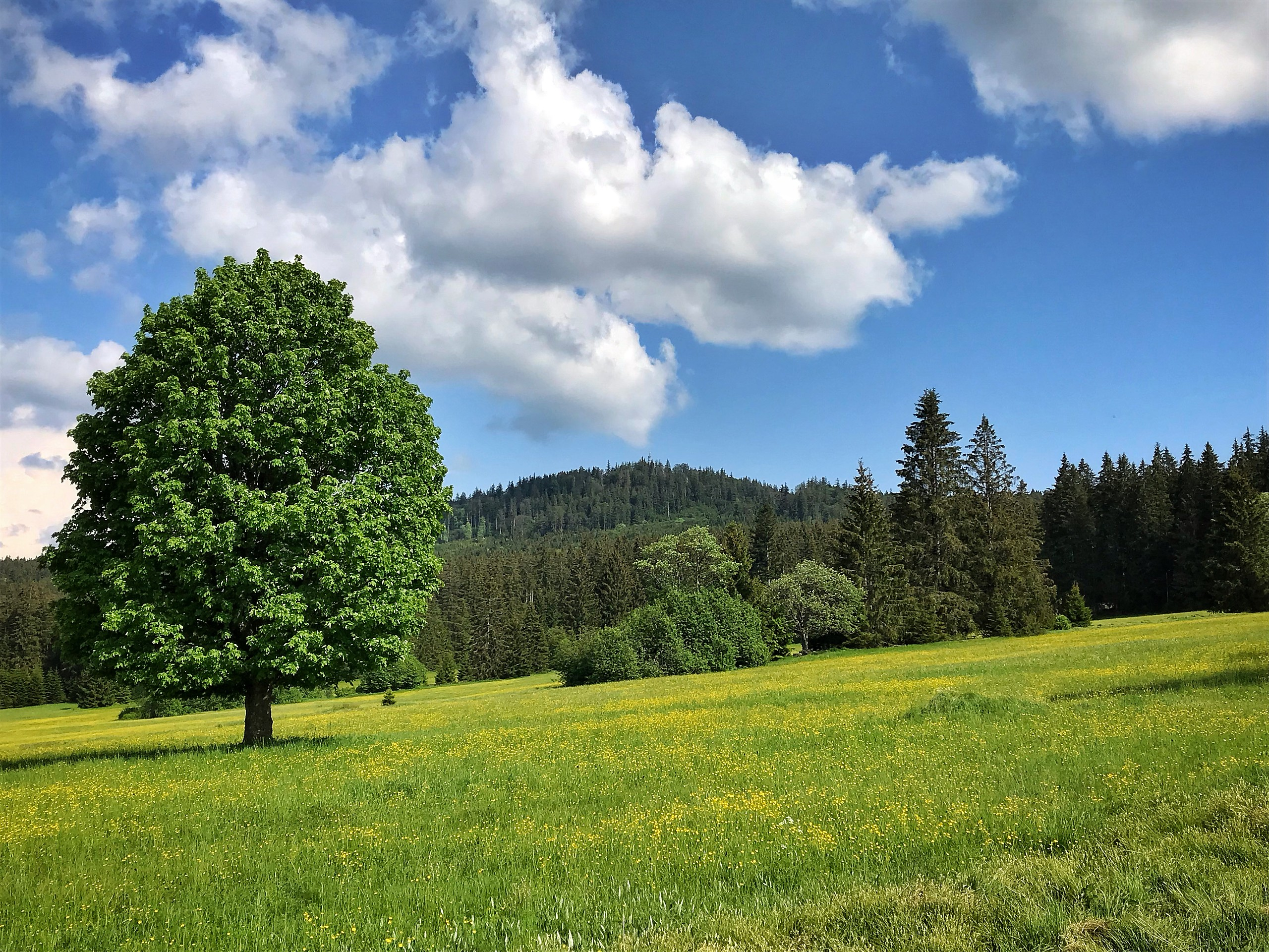 Žlíbský vrch (1133 m) na Šumavě od bývalé vsi Polka